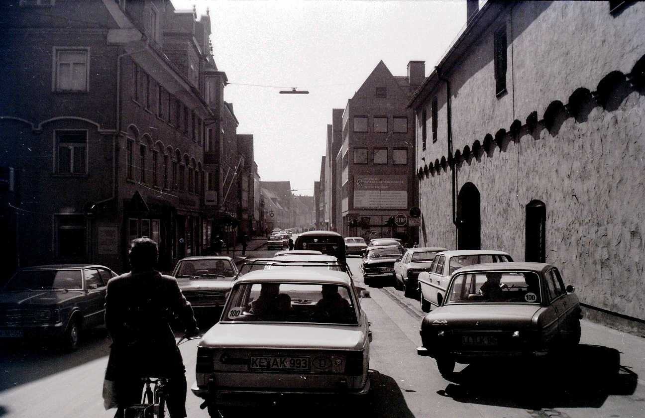 Die Salzstraße in Memmingen. Rechts der Salzstadel.